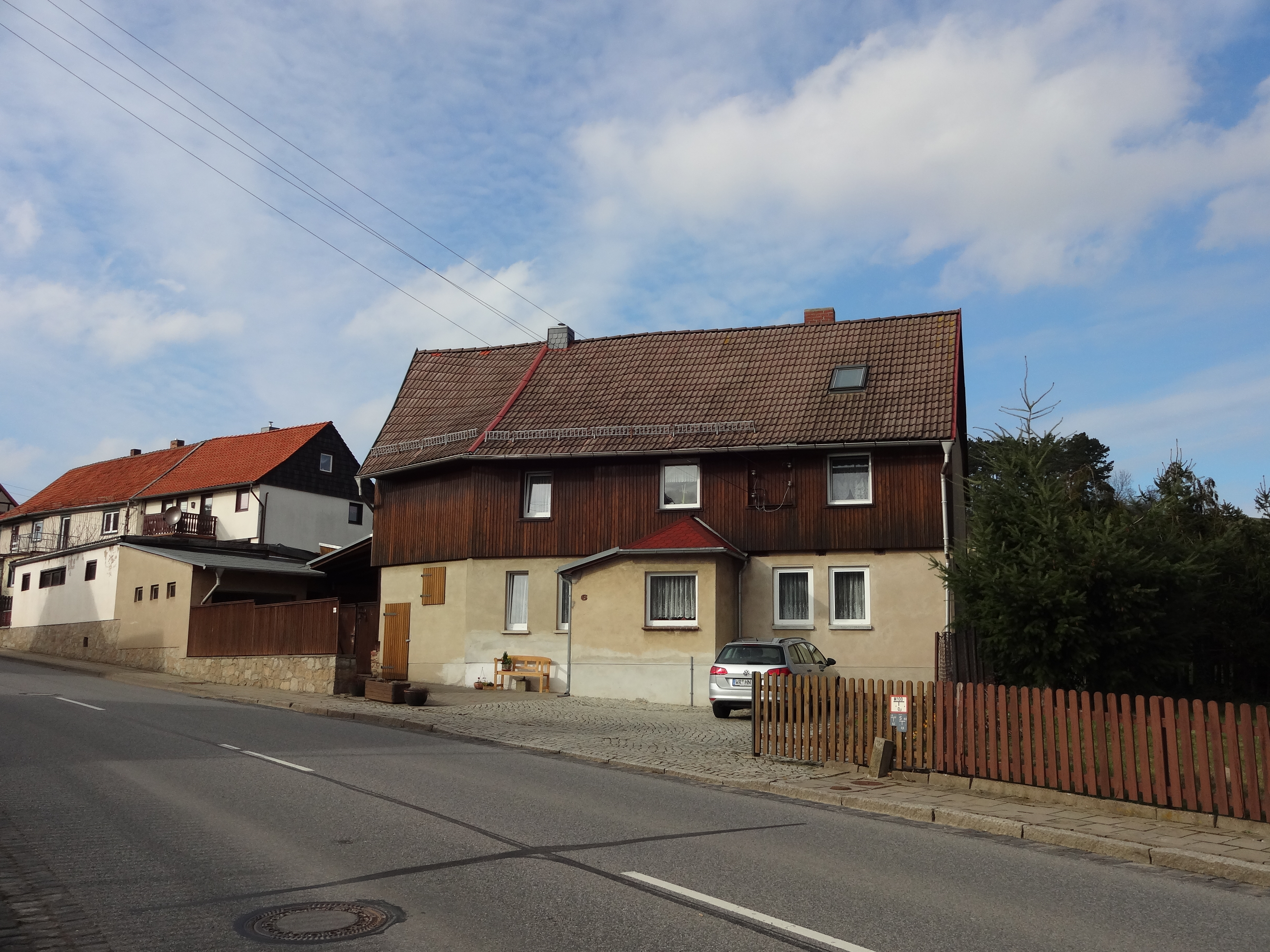 ehemaliges Kulturdenkmal in der Wernigeörder Straße 6 in Benzingerode, Ortsteil von Wernigerode